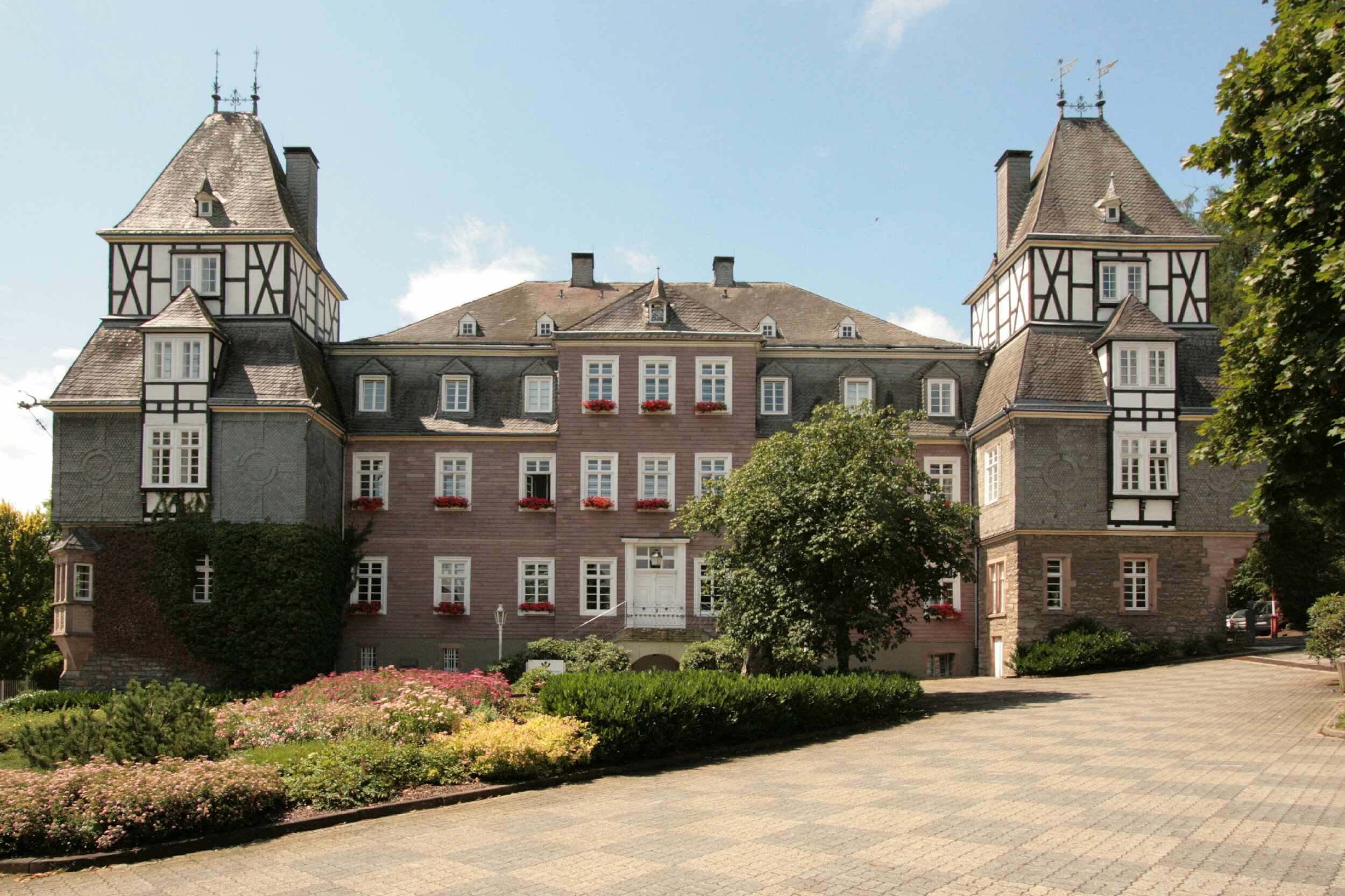 Beschreibung: Schloss Gevelinghausen, Hofansicht Quelle: Eigenes Foto Urheber: Wolfgang Poguntke Aufnahmedatum : 12.07.2008